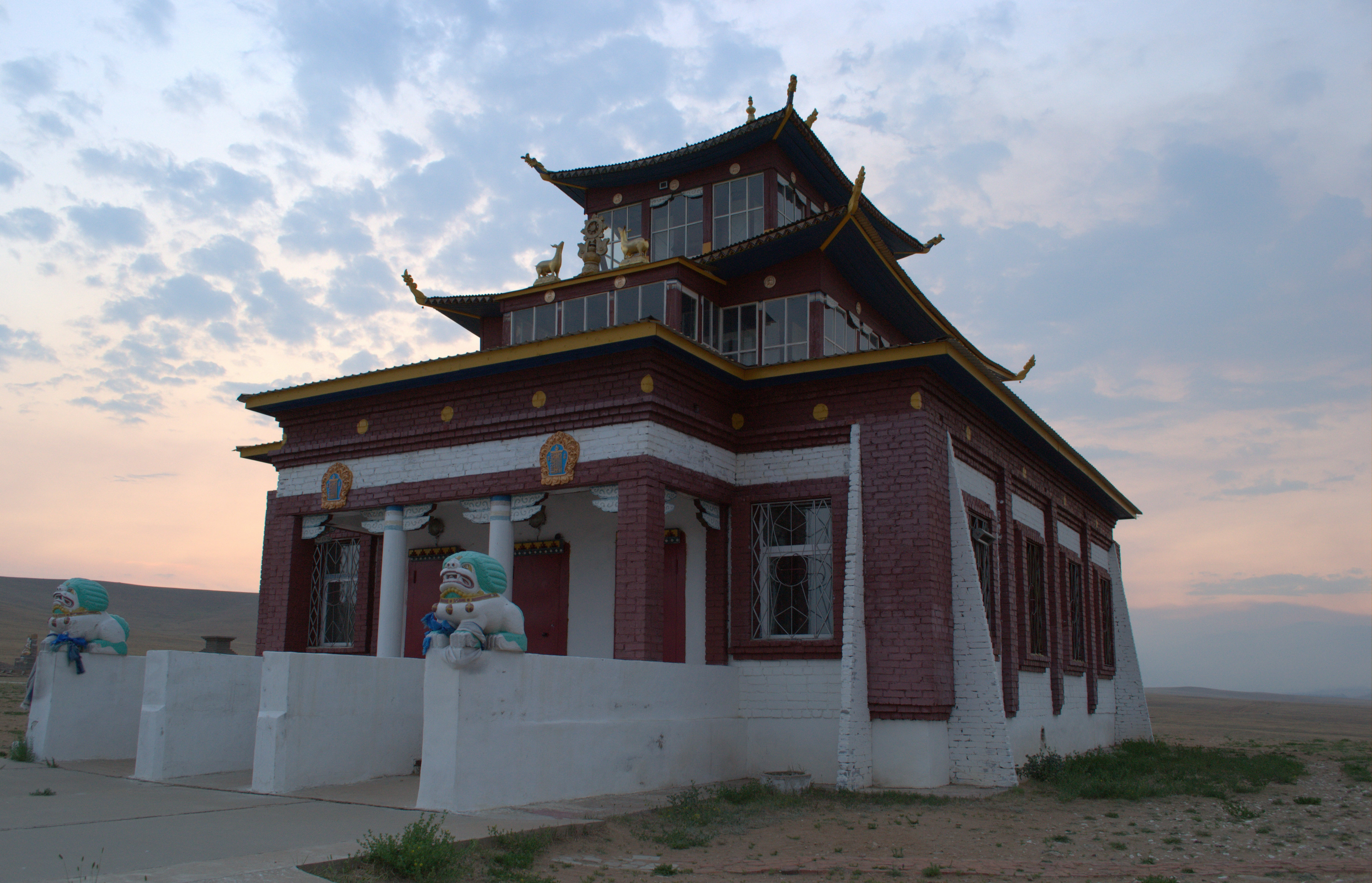 Цогчен-дуган в Ацагатском дацане. Заиграевский район, Бурятия, Сибирь